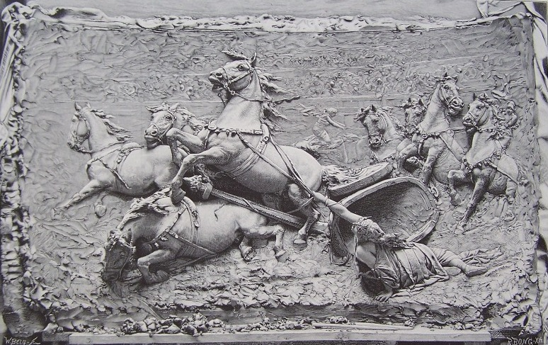 RÖMISCHES WAGENRENNEN.